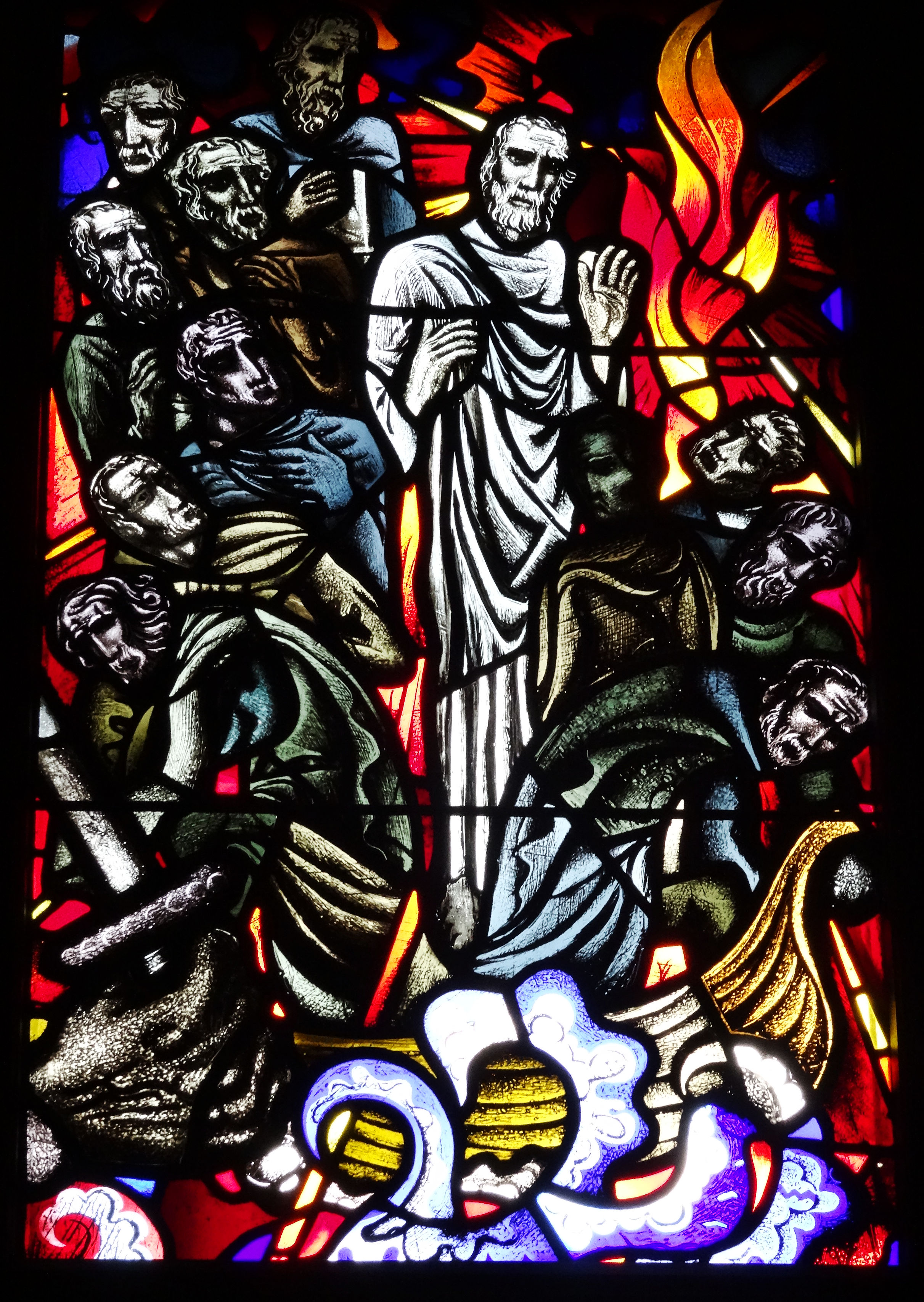 Detail raam II De legende van het licht van Zeerijp. De vijf gedenkramen in de aula van het Academiegebouw in Groningen werden tussen 1937 en 1951 gemaakt door de kunstenaar Johan Dijkstra.